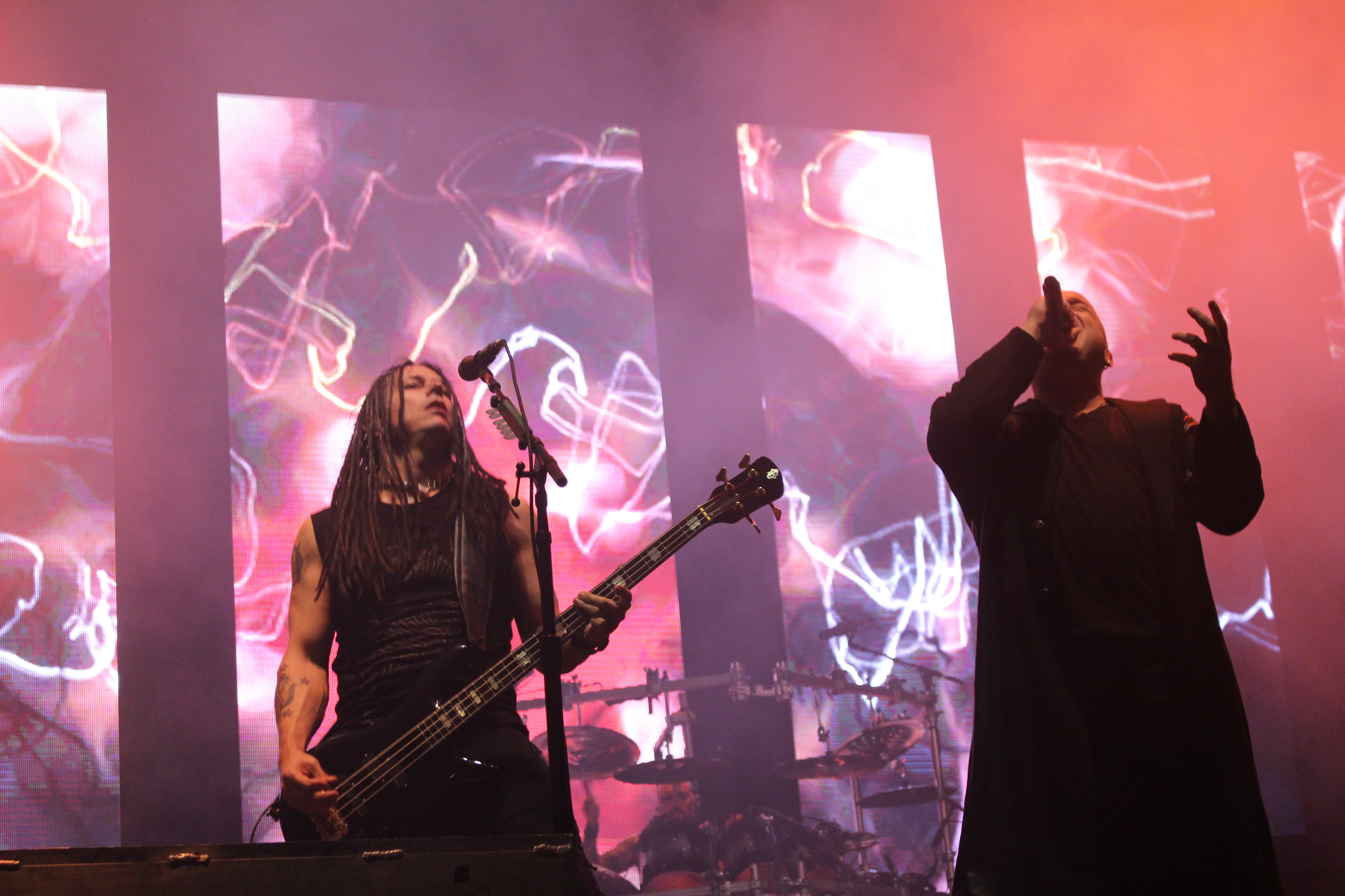 Festivalsommer This photo was created with the support of donations to Wikimedia Deutschland in the context of the CPB project "Festival Summer". Personality rights warningAlthough this work is freely licensed or in the public domain, the person(s) shown may have rights that legally restrict certain re-uses unless those depicted consent to such uses. In these cases, a model release or other evidence of consent could protect you from infringement claims.